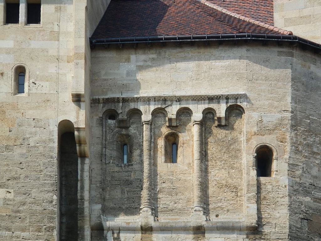 Burg Liechtenstein in Niederösterreich, Maria Enzersdorf im Süden von Wien